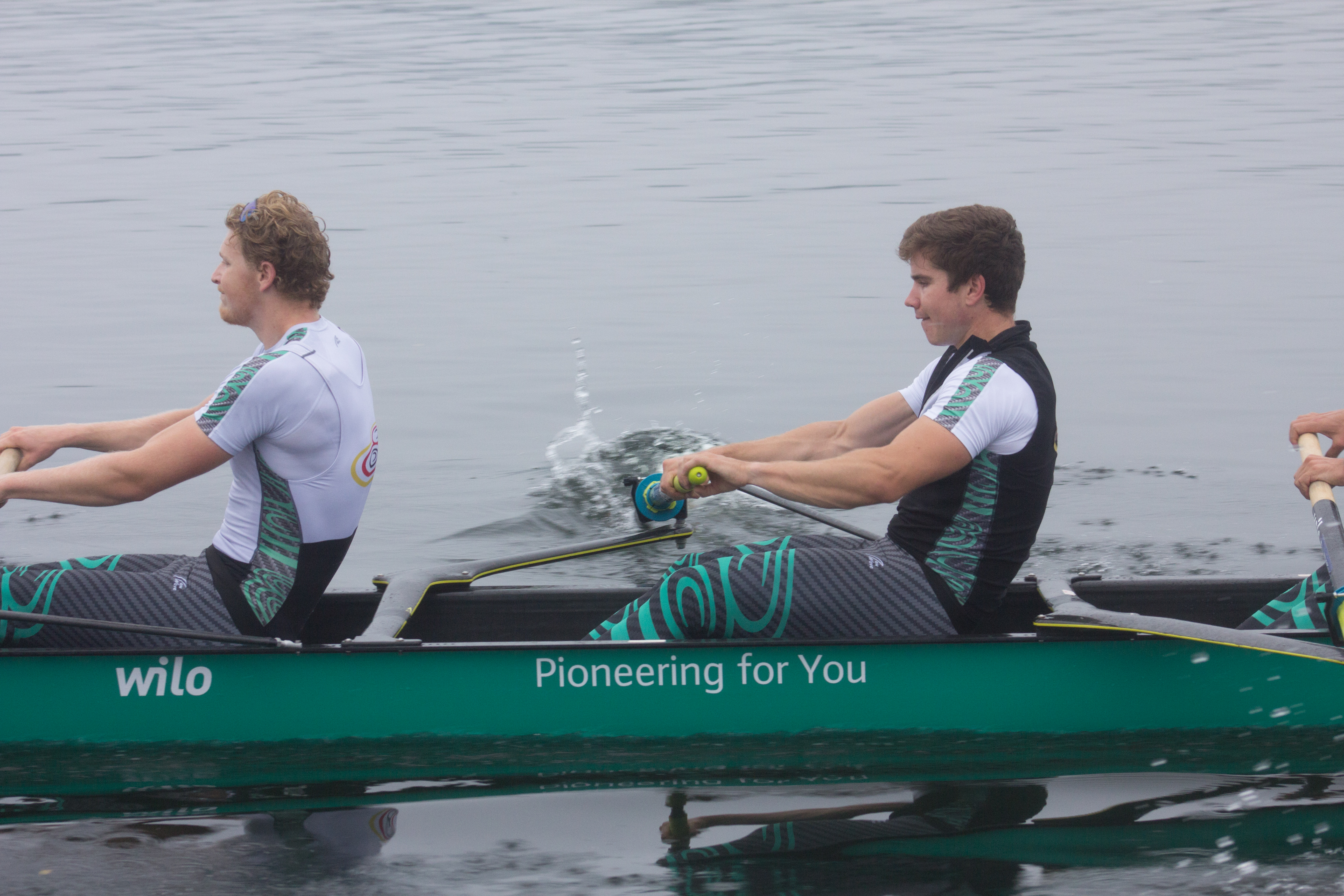 Medientag des Ruderverbandes in der Ruderakademie Ratzeburg am 6. September 2017: Deutschland-Achter im Training auf dem Ratzeburger See in der Besetzung: Johannes Weißenfeld, Felix Wimberger, Maximilian Planer, Torben Johannesen, Jakob Schneider, Malte Jakschik, Richard Schmidt, Hannes Ocik, Martin Sauer